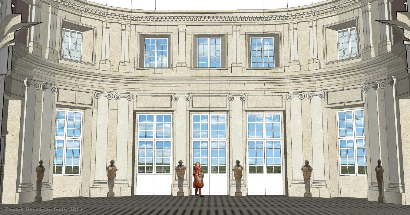 Essai de restitution du salon depuis l'entrée, par le Grand Escalier. Vers 1695.